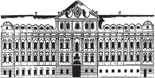 Чертёж дома Балков из коллекции Берхгольца. 1740-е